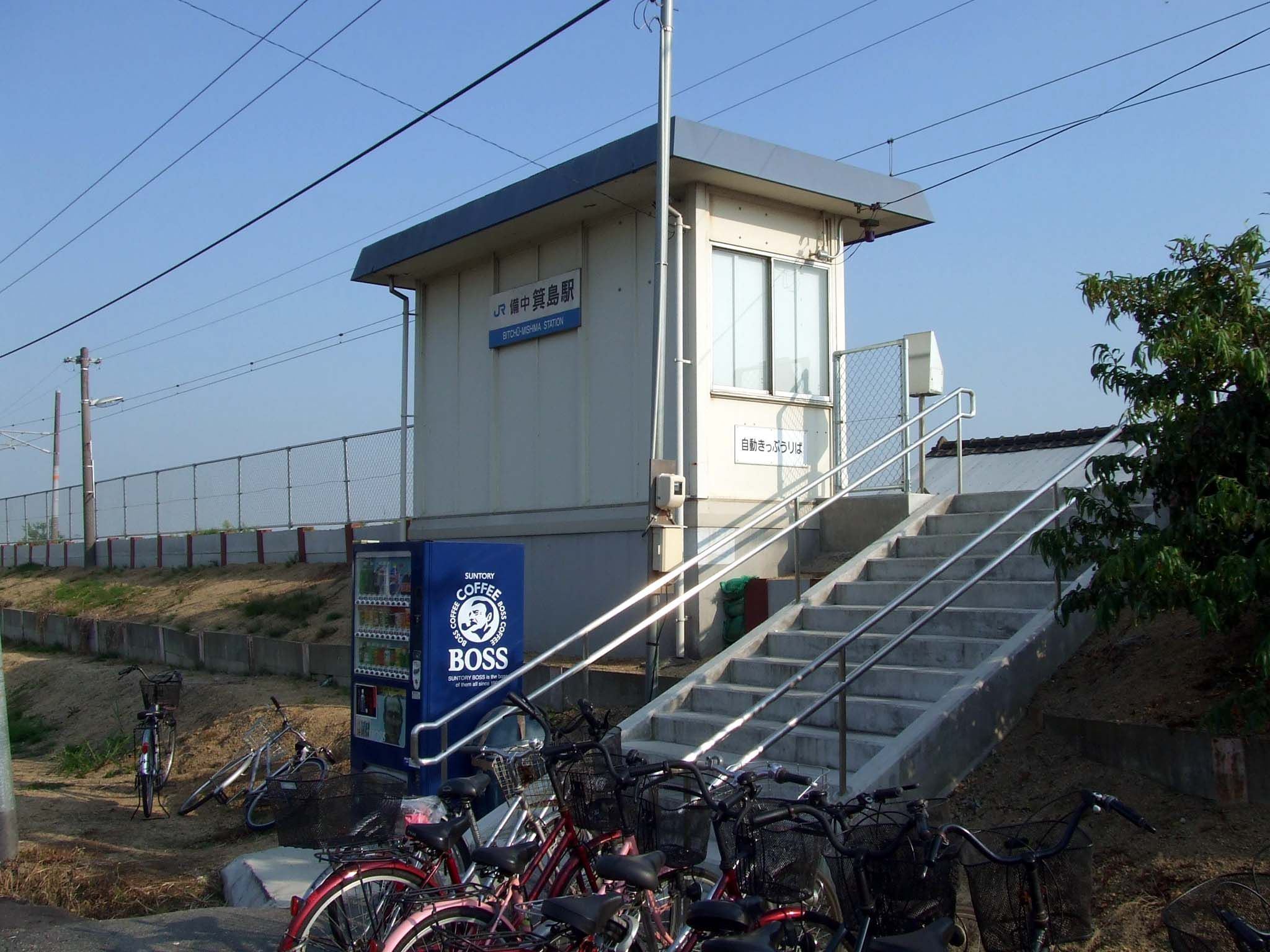 2007年10月11日、投稿者本人が撮影。JR西日本、備中箕島駅。